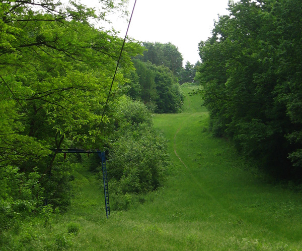 Кайзервальд (пар "Знесенье"), Львов, горнолыжная трасса